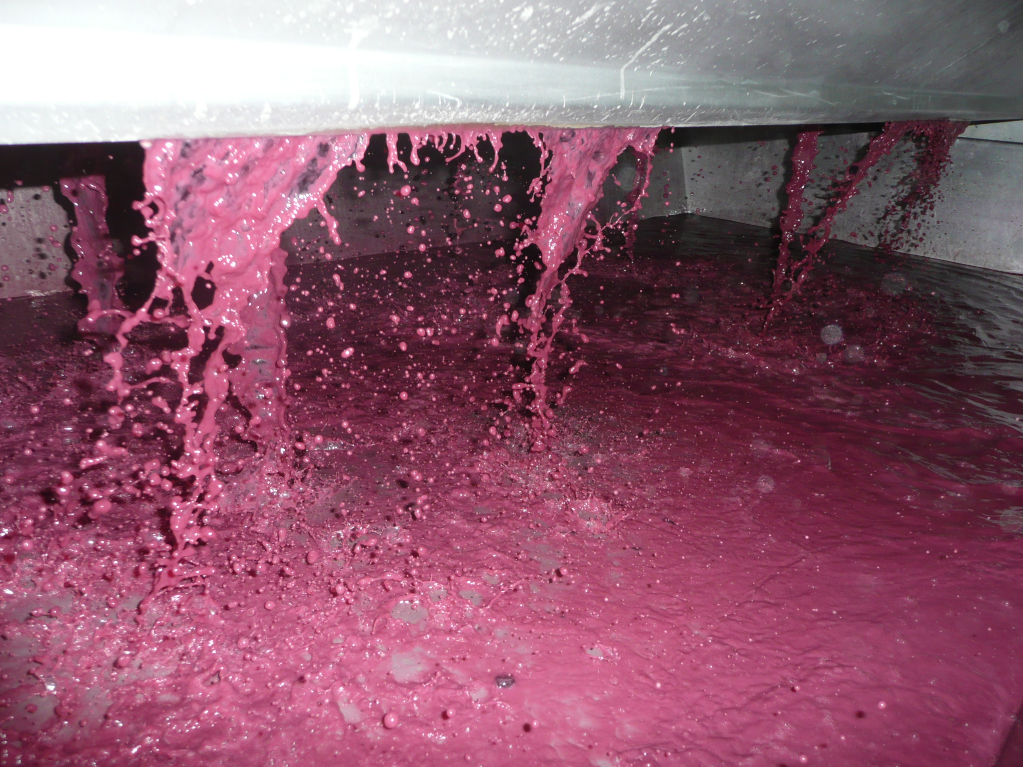 Rotmost läuft von der Presse ab. Im Wörterbuch der deutschen Winzersprache als Abwirzen beschrieben.